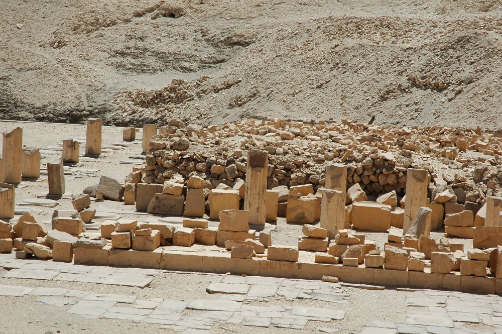 Kernbau und Ambulatorium des Totentempel des Mentuhotep II. in Deir el-Bahari